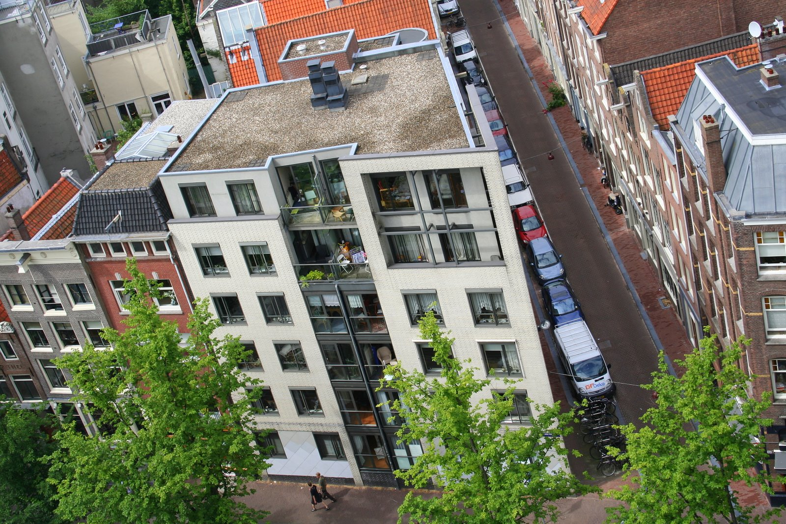 Stadsvernieuwing in de Jordaan, hoek Prinsengracht-Bloemstraat, seniorenhuisvesting uit 1993